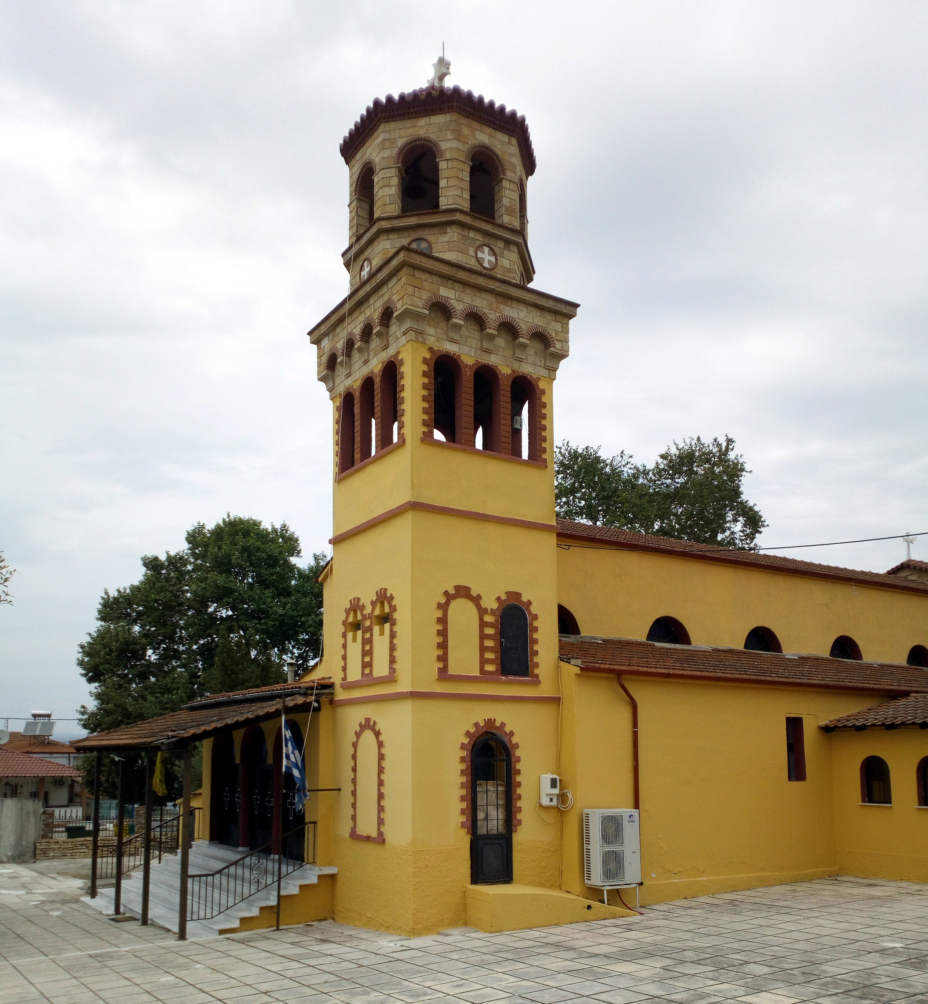 Η νέα εκκλησία του χωριού.